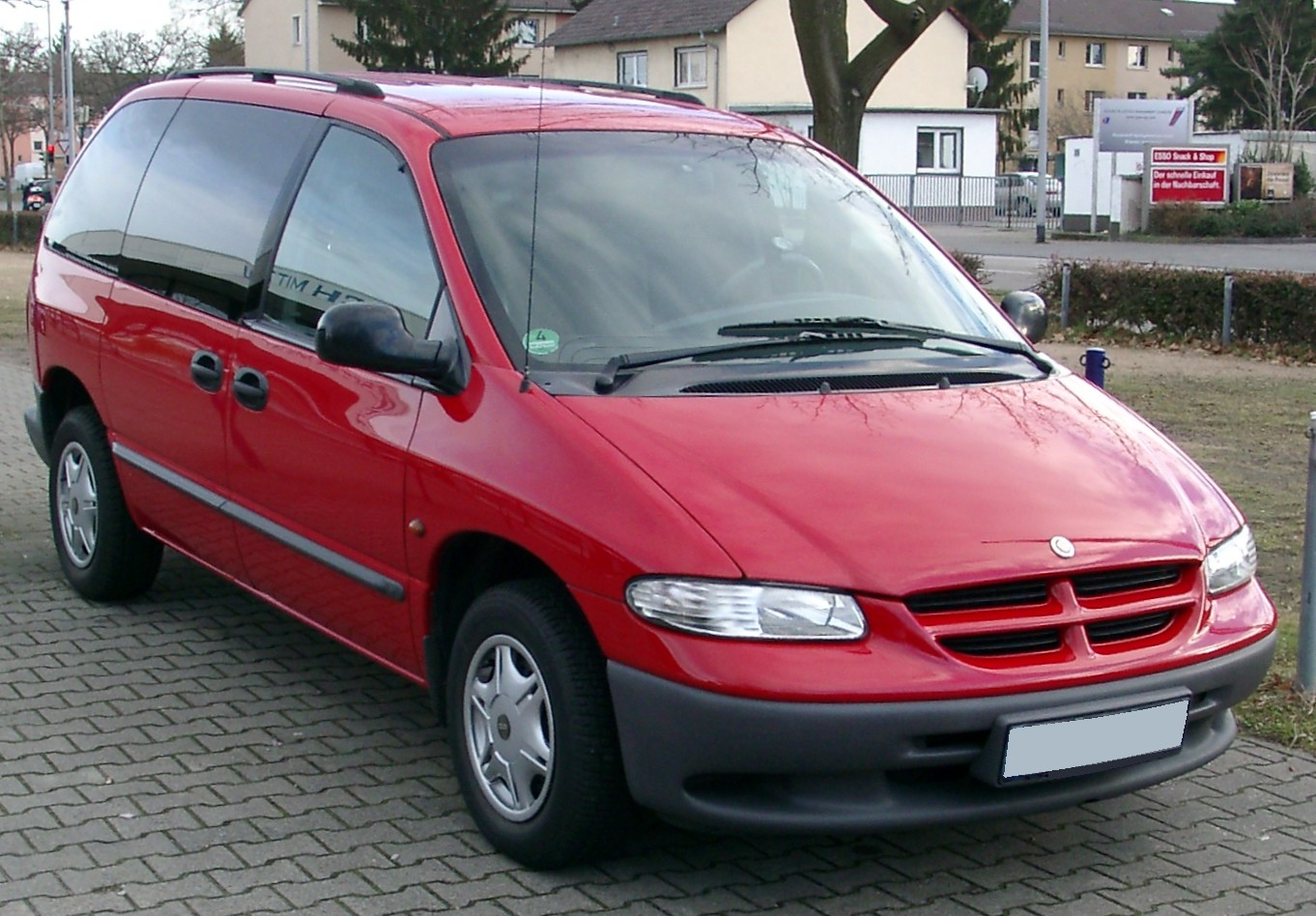 Chrysler Voyager, 3. Generation